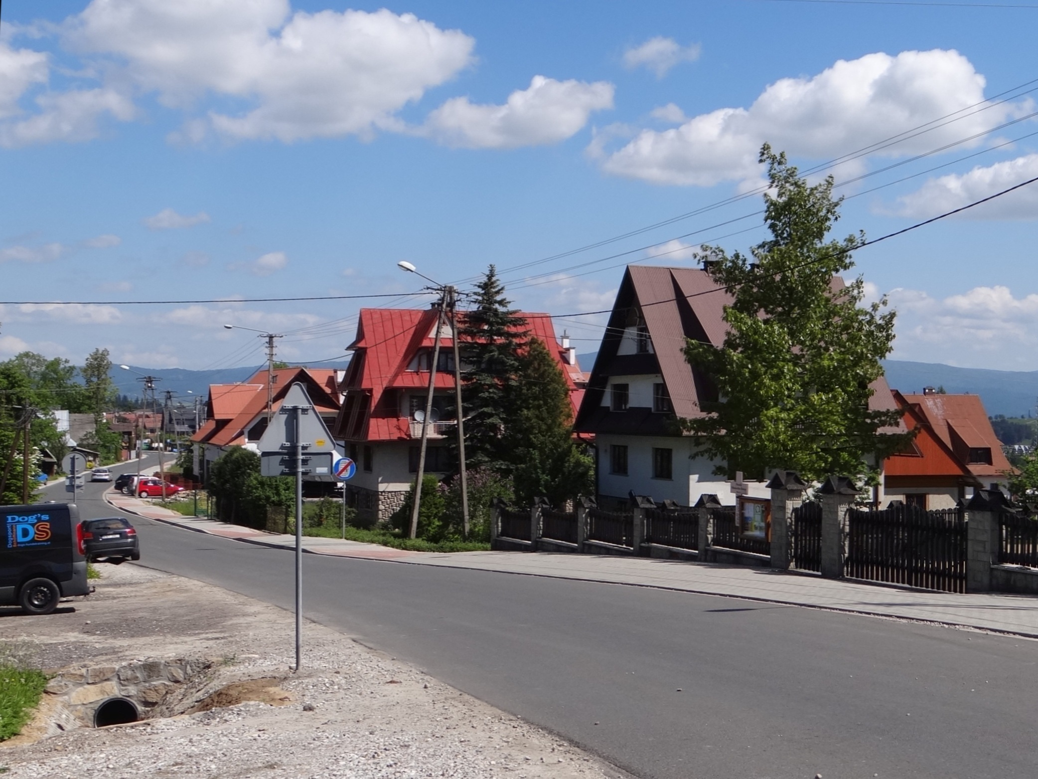 Bańska Niżna. Gówna ulica